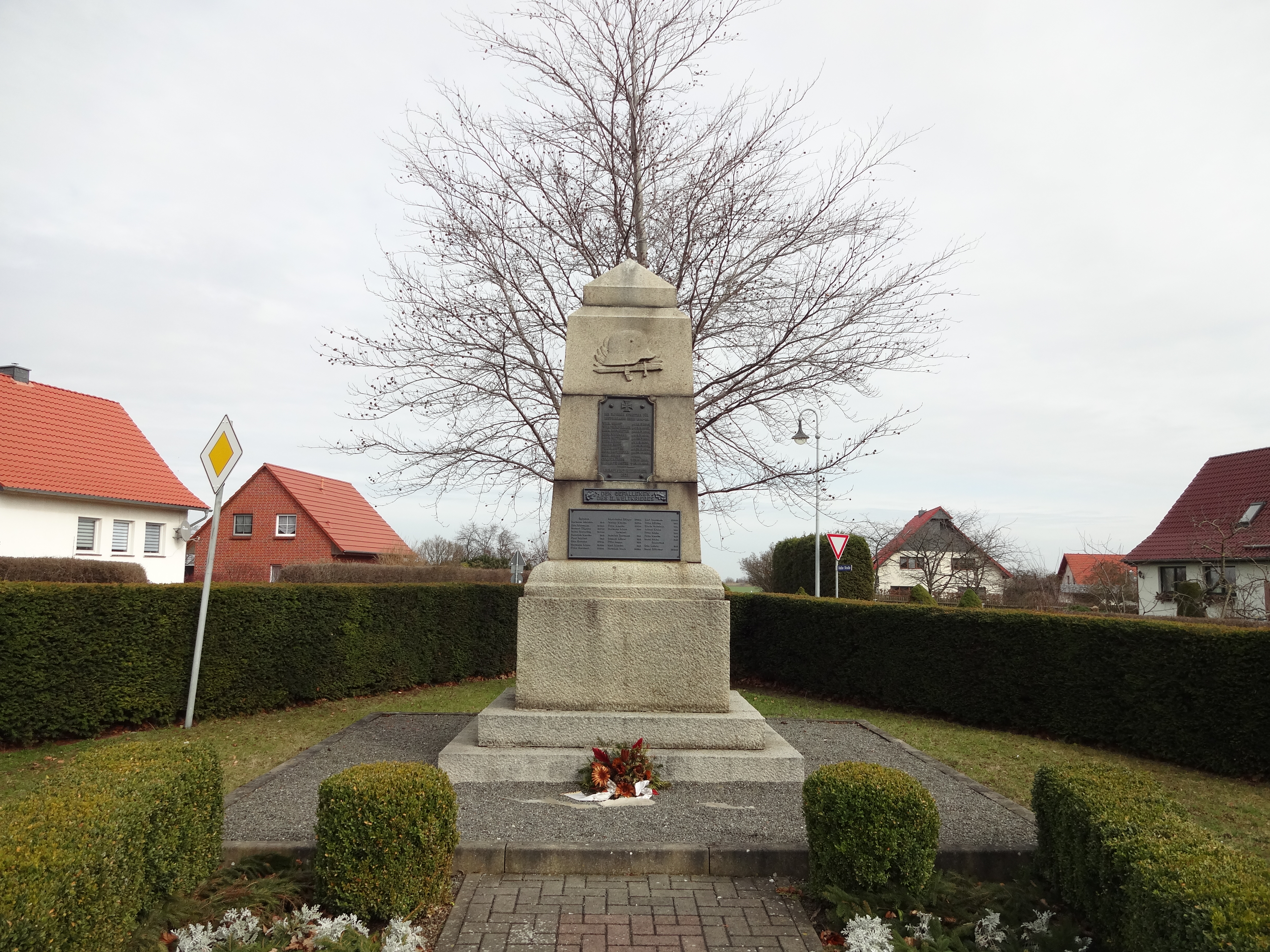 denkmalgeschütztes Kriegerdenkmal in Reddeber; Ortsteil von Wernigerode